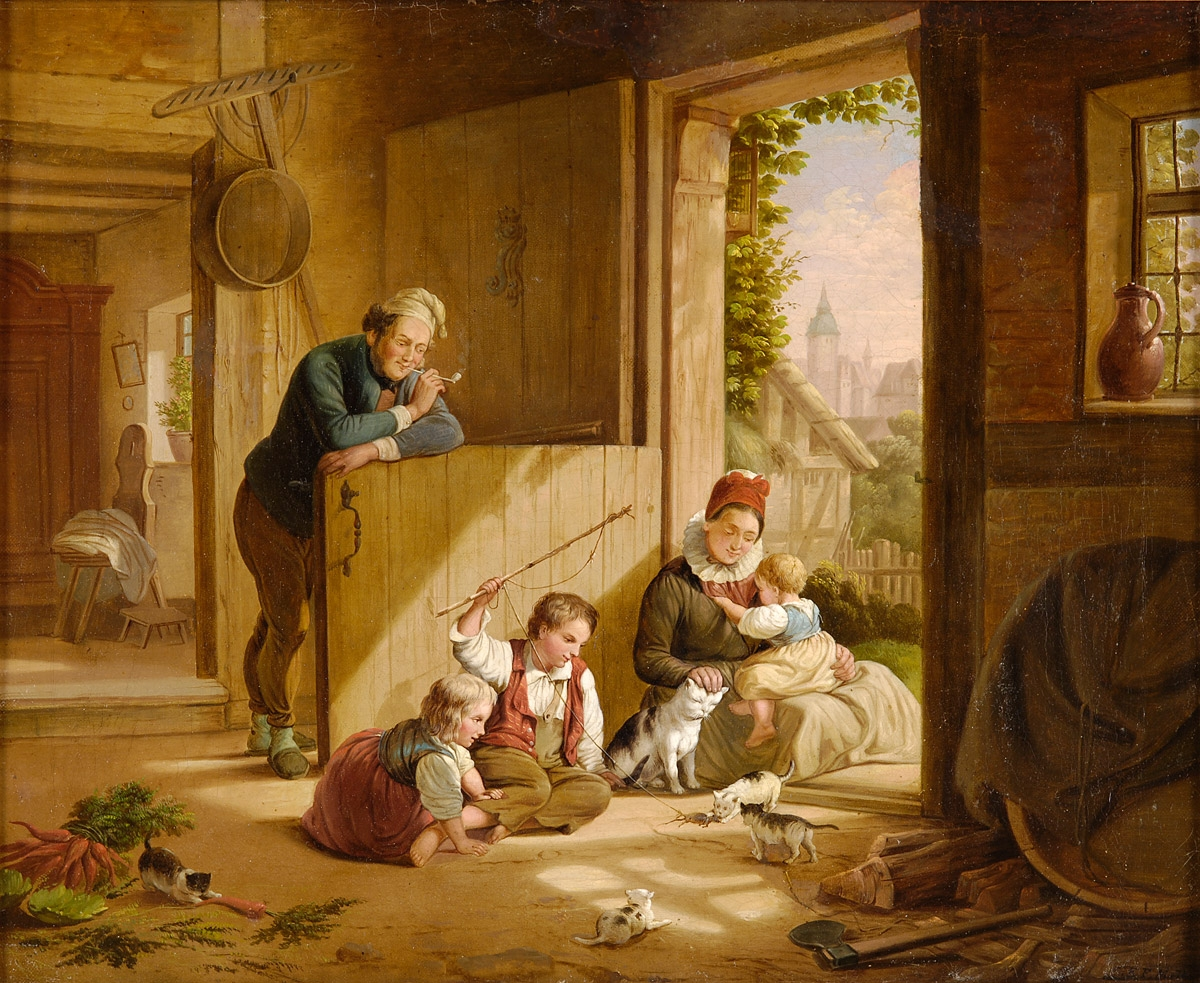 Eine glückliche Familie. Monogrammiert. Datiert (18) 72. Öl auf Leinwand, 43 x 53 cm